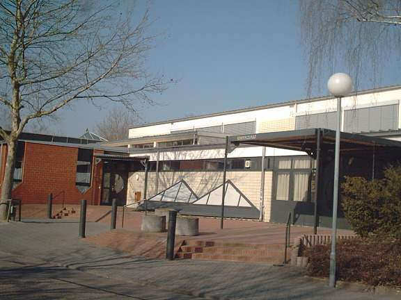 Oftersheim, Kurpfalzhalle (Vorderansicht)